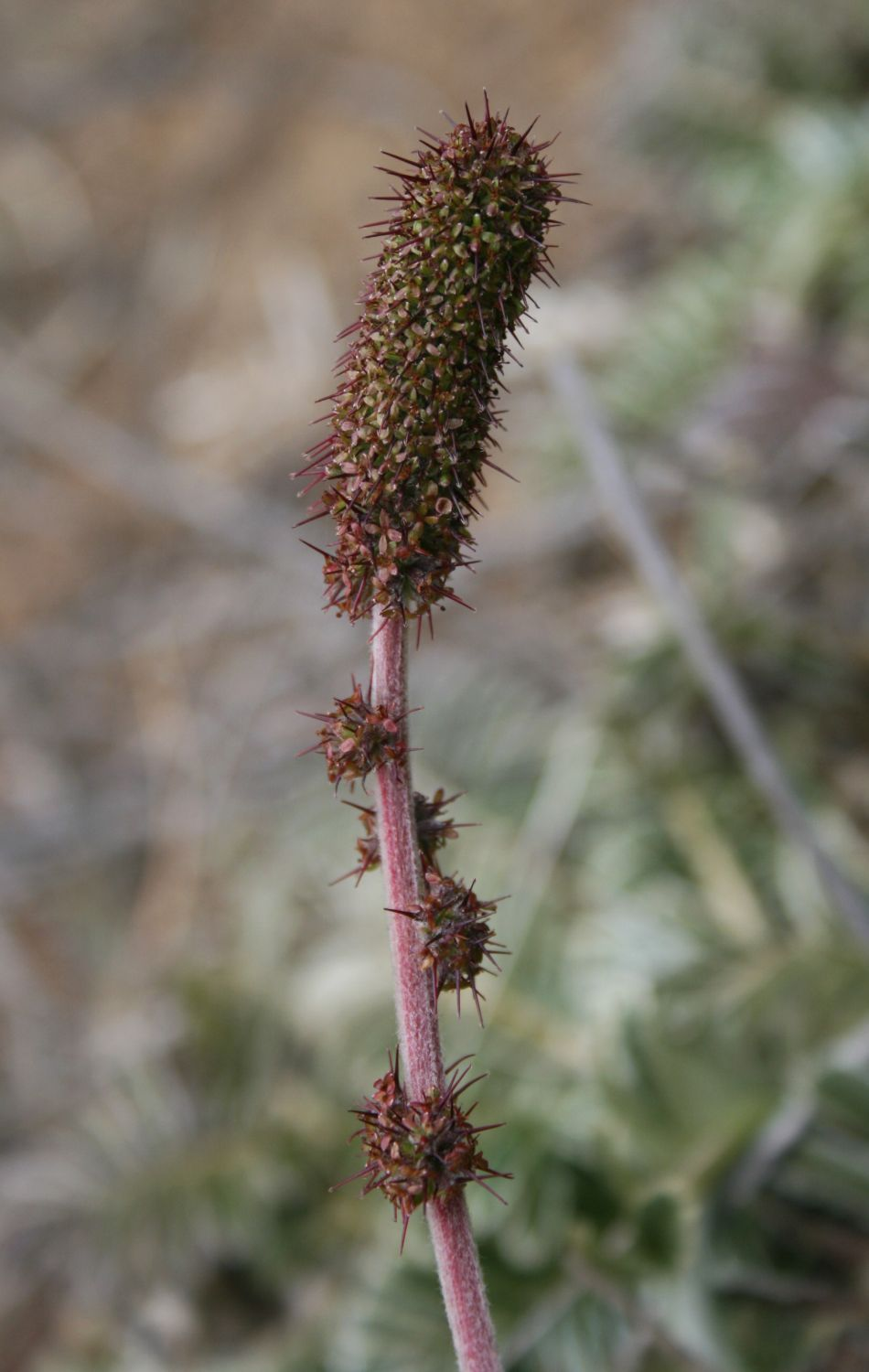 Acaena cylindristachya, Rosaceae - Costa Rica: Prov. San José, Cordillera de Talamanca, Cerro Sákira E Carretera Interamericana, 3200-3300 m